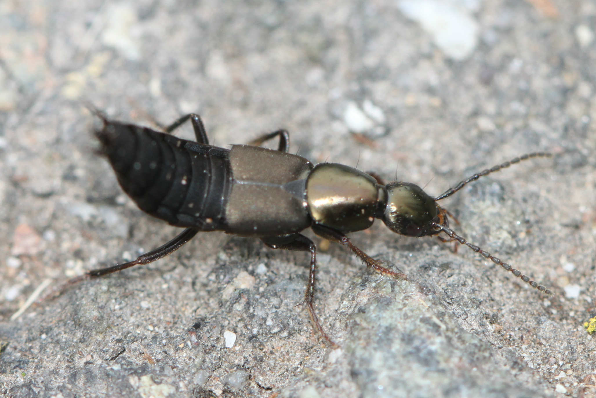 Philonthus cf. decorus am 4.3.2017 in der Schwetzinger Hardt